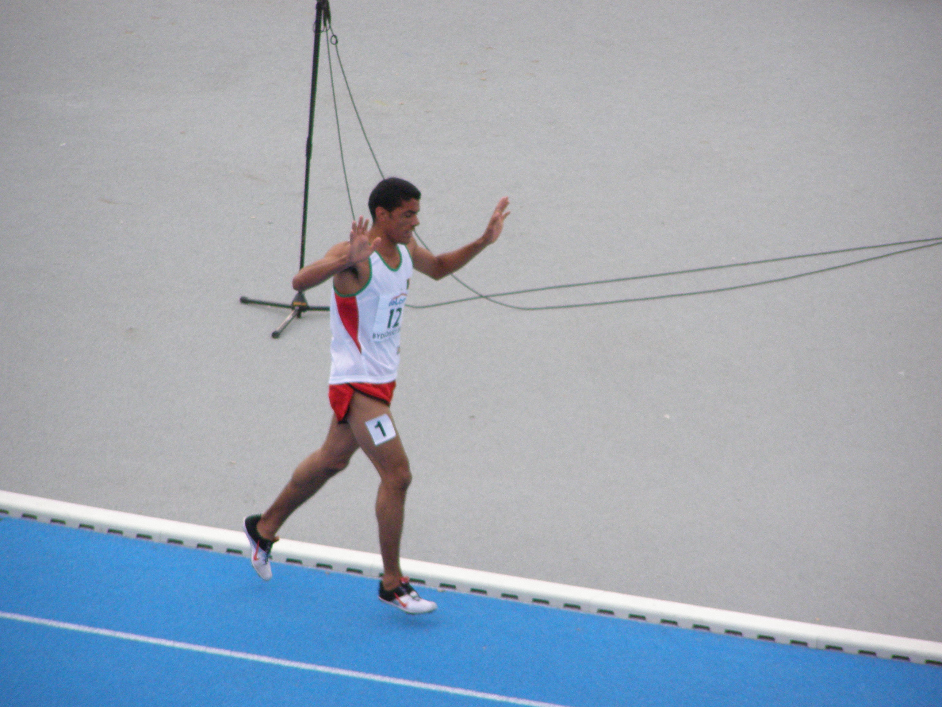 Mistrzostwa Świata Juniorów w Lekkoatletyce - Bydgoszcz 2008 - Imad Touil - złoty medalista w biegu na 1500m.